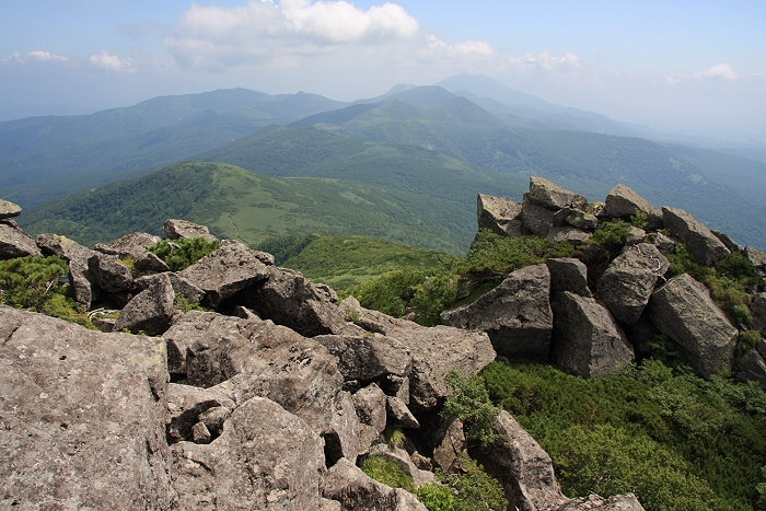 目国内岳から俯瞰するニセコ連峰